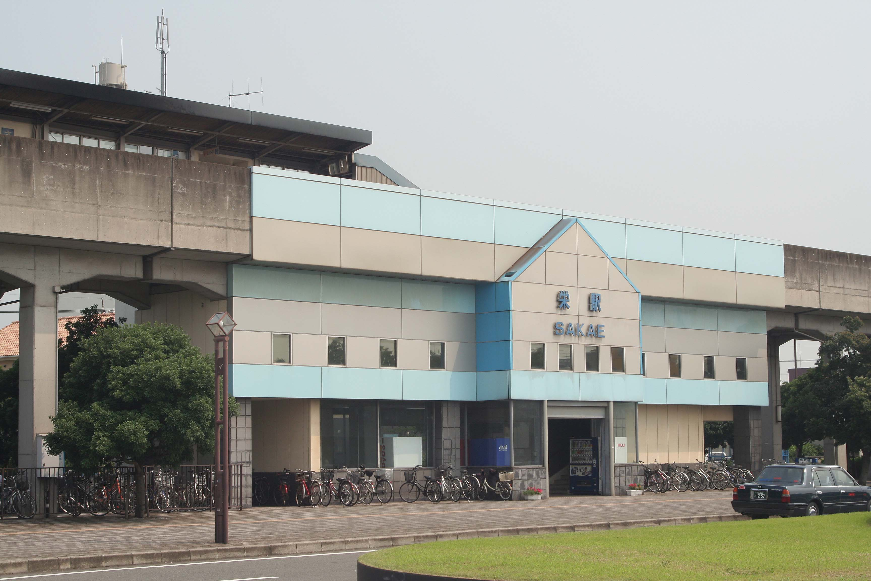 水島臨海鉄道、栄駅の駅舎